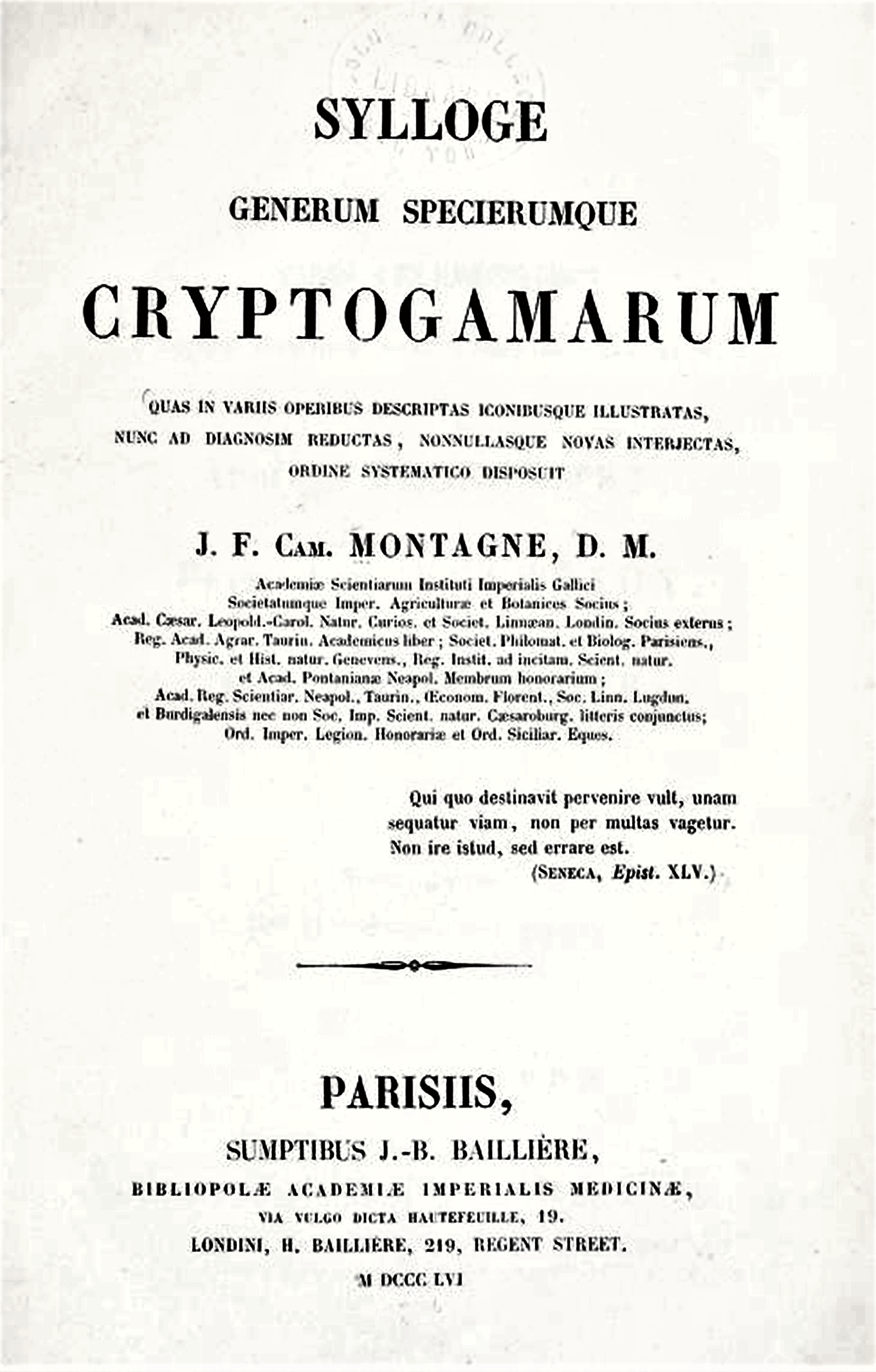 Camille Montagne: „Sylloge generum specierumque cryptogamarum, quas in variis operibus descriptas iconibusque illustratas, nunc ad diagnosim reductas, nonnullasque novas interjectas / ordine systematico disposuit”, Editura J.-B.Baillière, Paris 1856